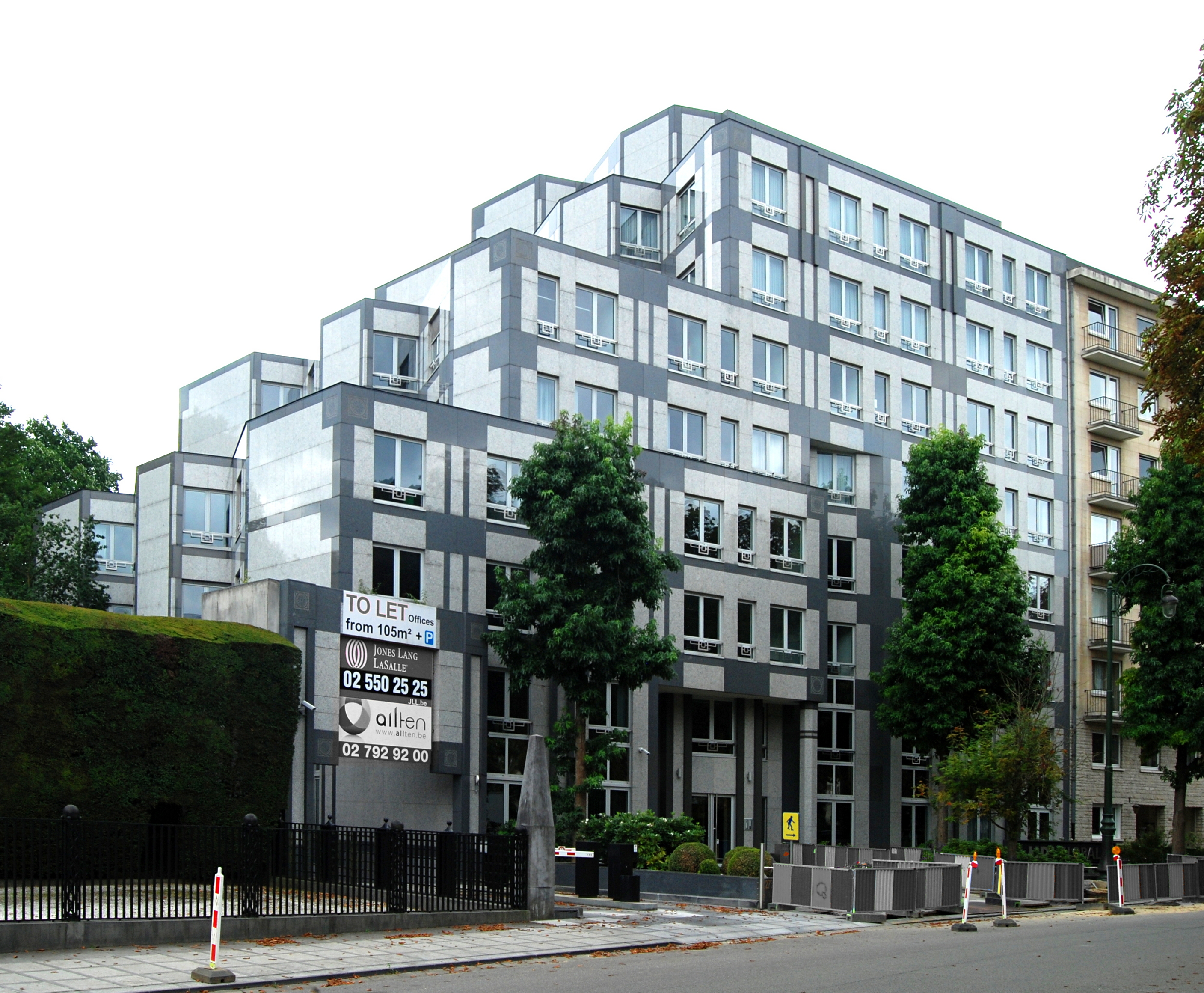 Belgique - Bruxelles - Gerling Haus (architecture postmoderne - René Stapels - 1988)